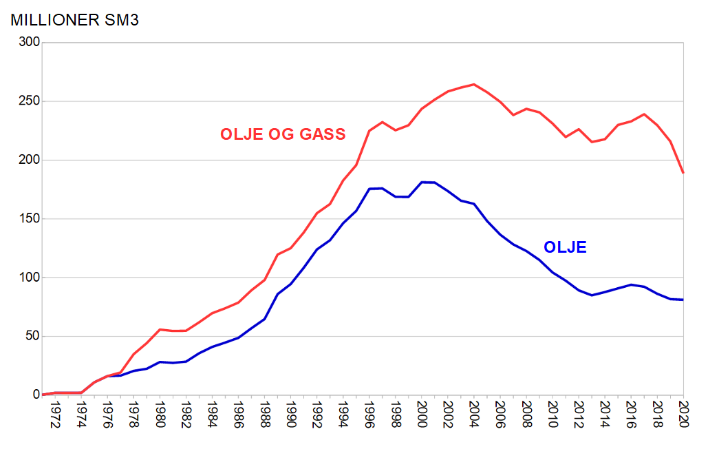 Norsk olje- og gassproduksjon volum pr år i perioden 1971 til og med 2012. Rekkje Olje: Tal for produsert råolje i millionar standard m³. Rekkje O.e omfattar både råolje og naturgass, samt NGL og naturgasskondensat, dei siste to i relativt mindre mengder, tala er i millionar Sm³ oljeekvivalentar.